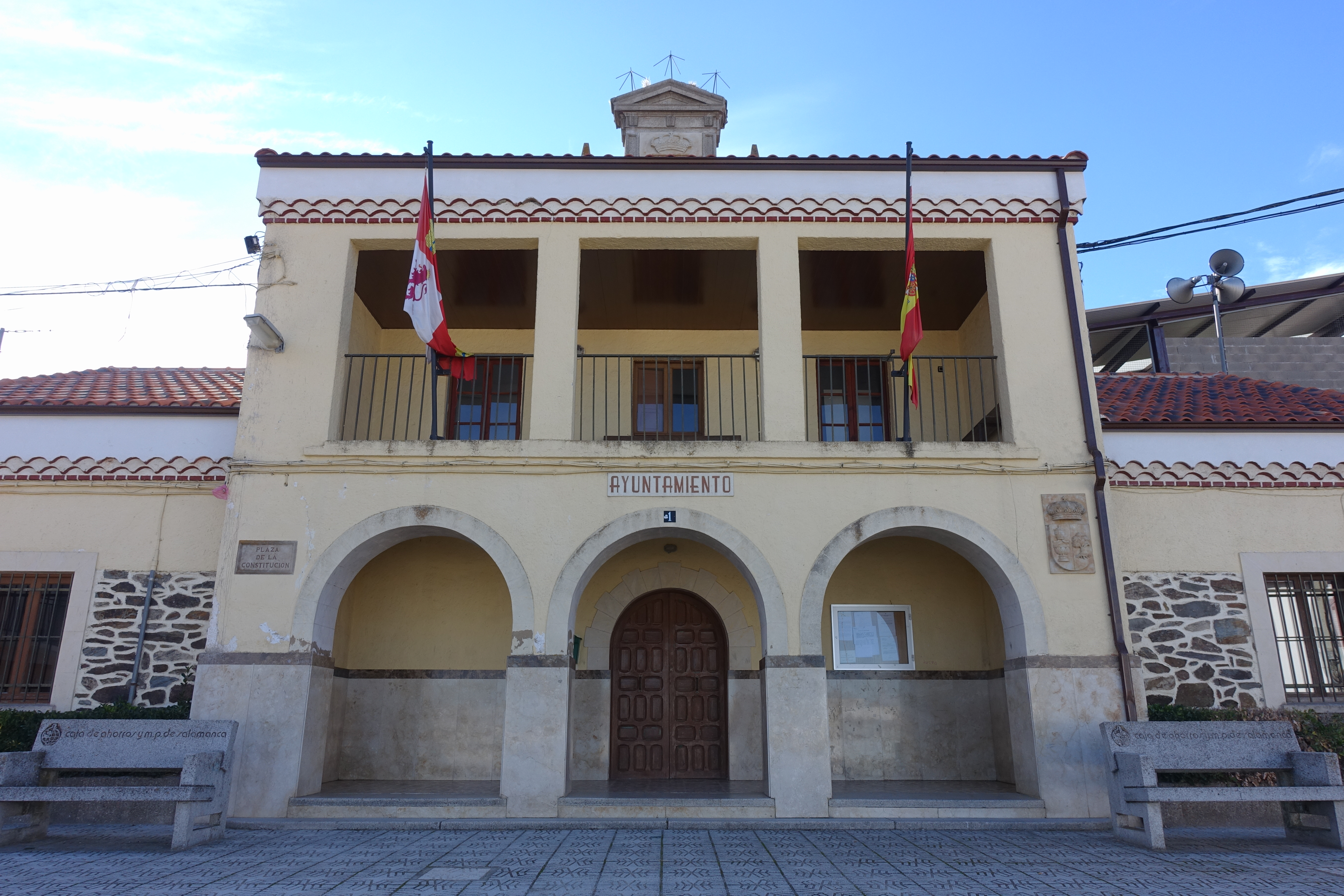 Casa consistorial de Ituero de Azaba (Salamanca, España).